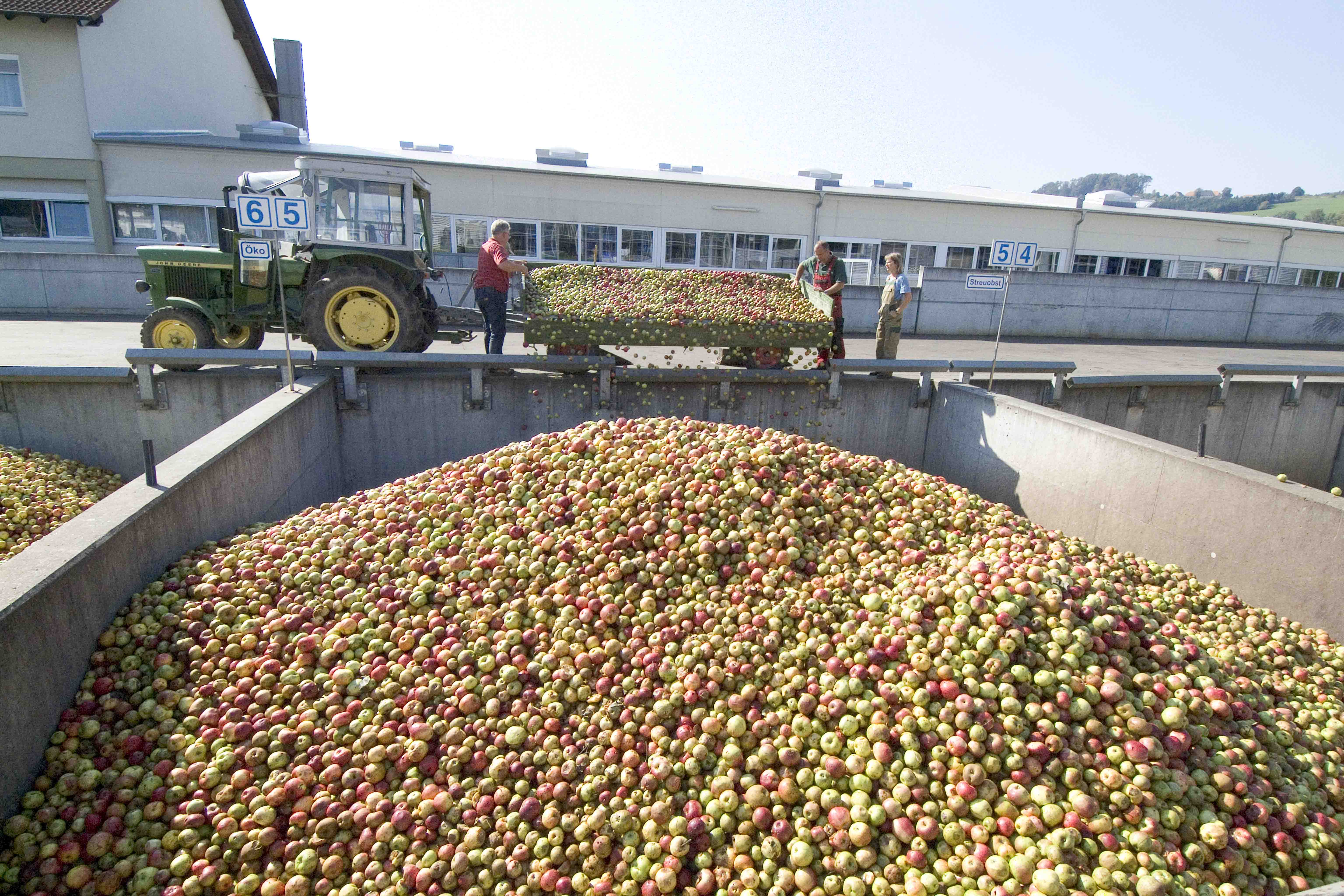 Anlieferung Äpfel